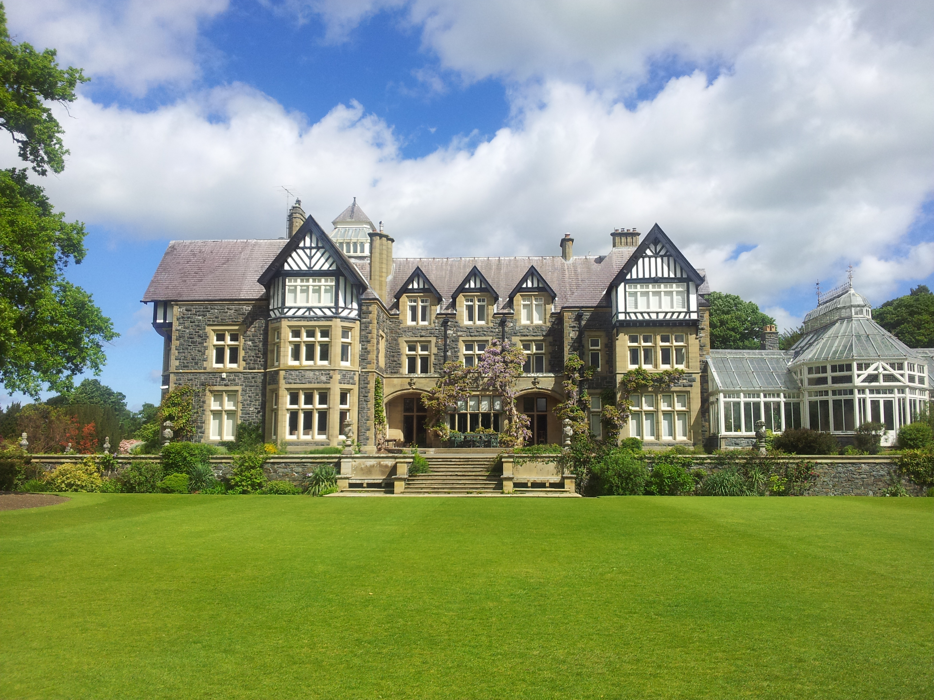 Das Herrenhaus im Bodnant Garden, Nordwales